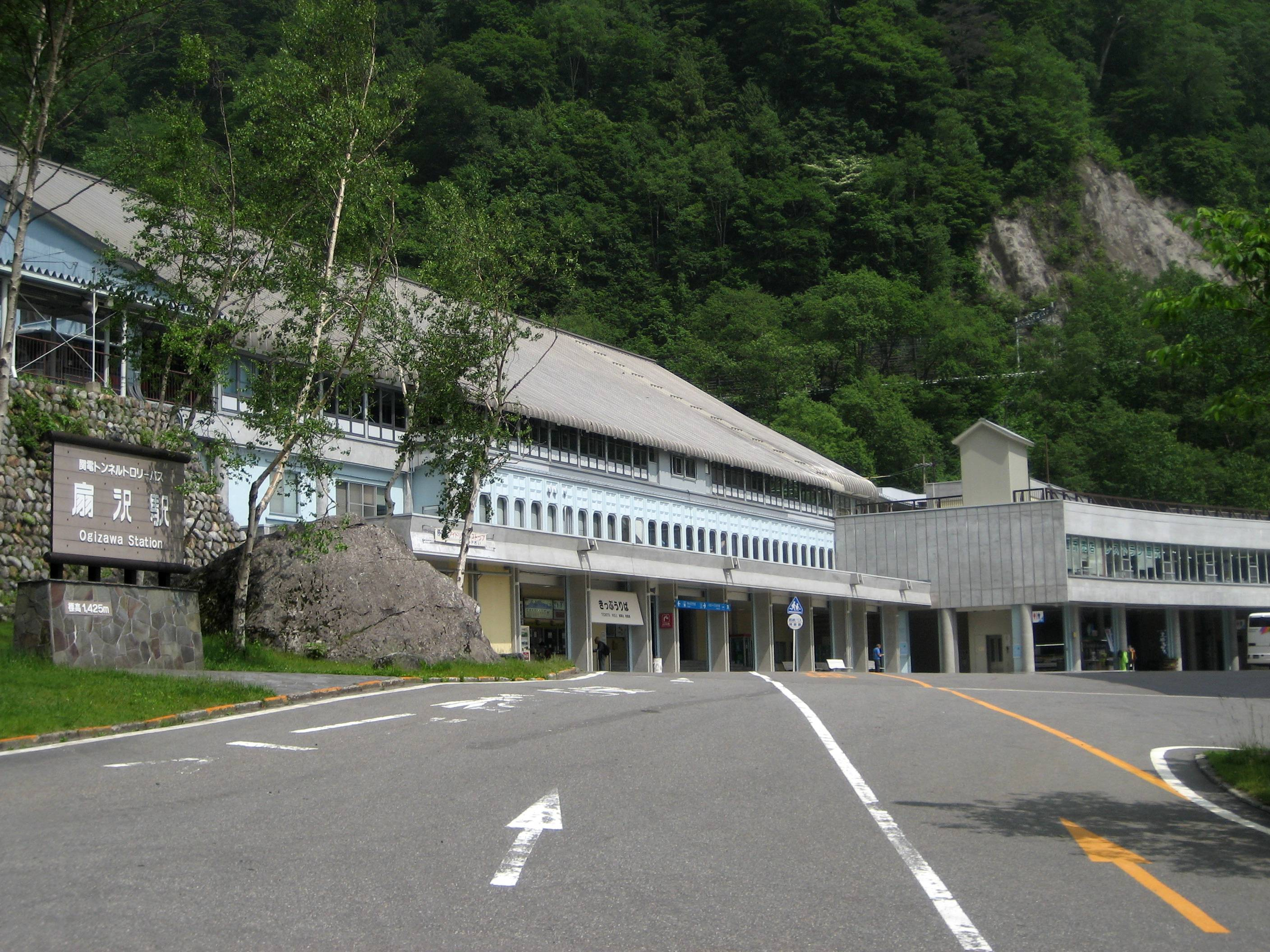 Ogisawa station (扇沢駅).